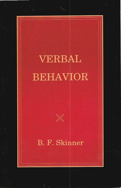 Cover of Verbal Behavior by B.F.Skinner